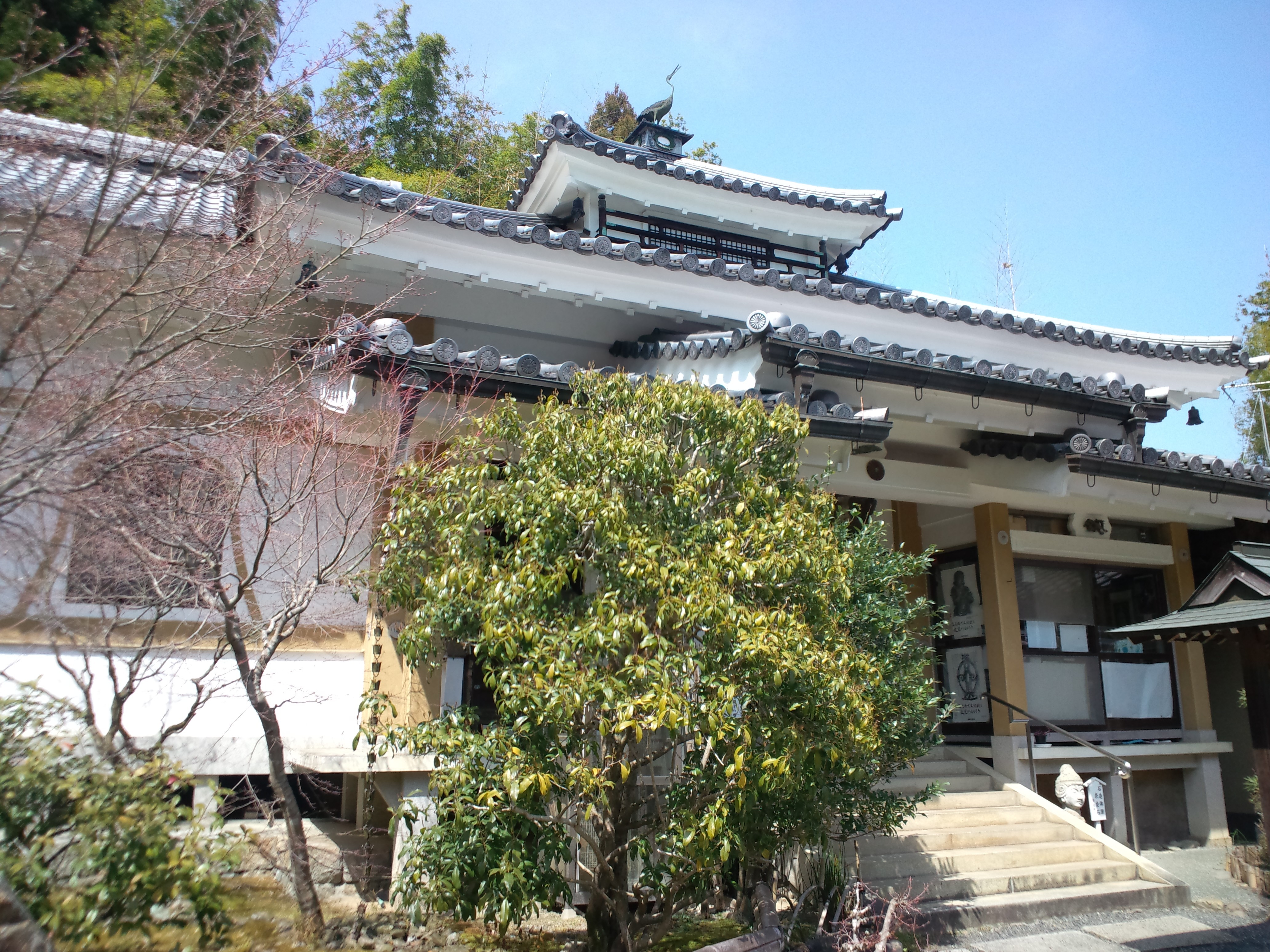 檀林寺 本堂